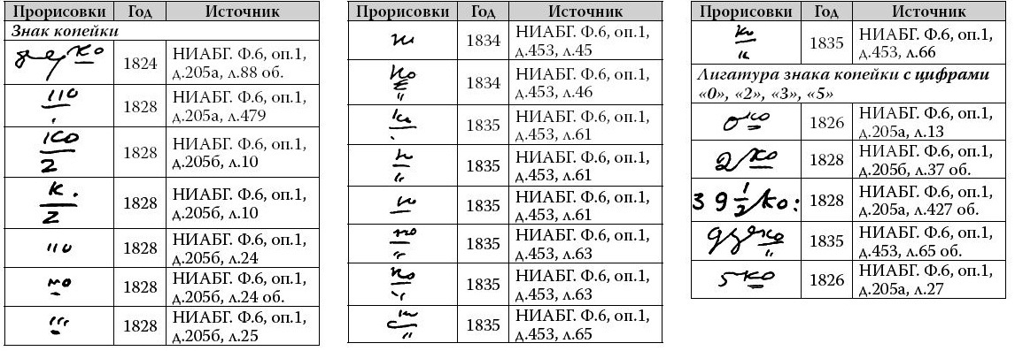 Прорисовка знака копейки и лигатур знака копейки с цифрами в документах 1820-1830 годов из Национального исторического архива Беларуси в г. Гродно (НИАБГ, ф. 6, оп. 1)